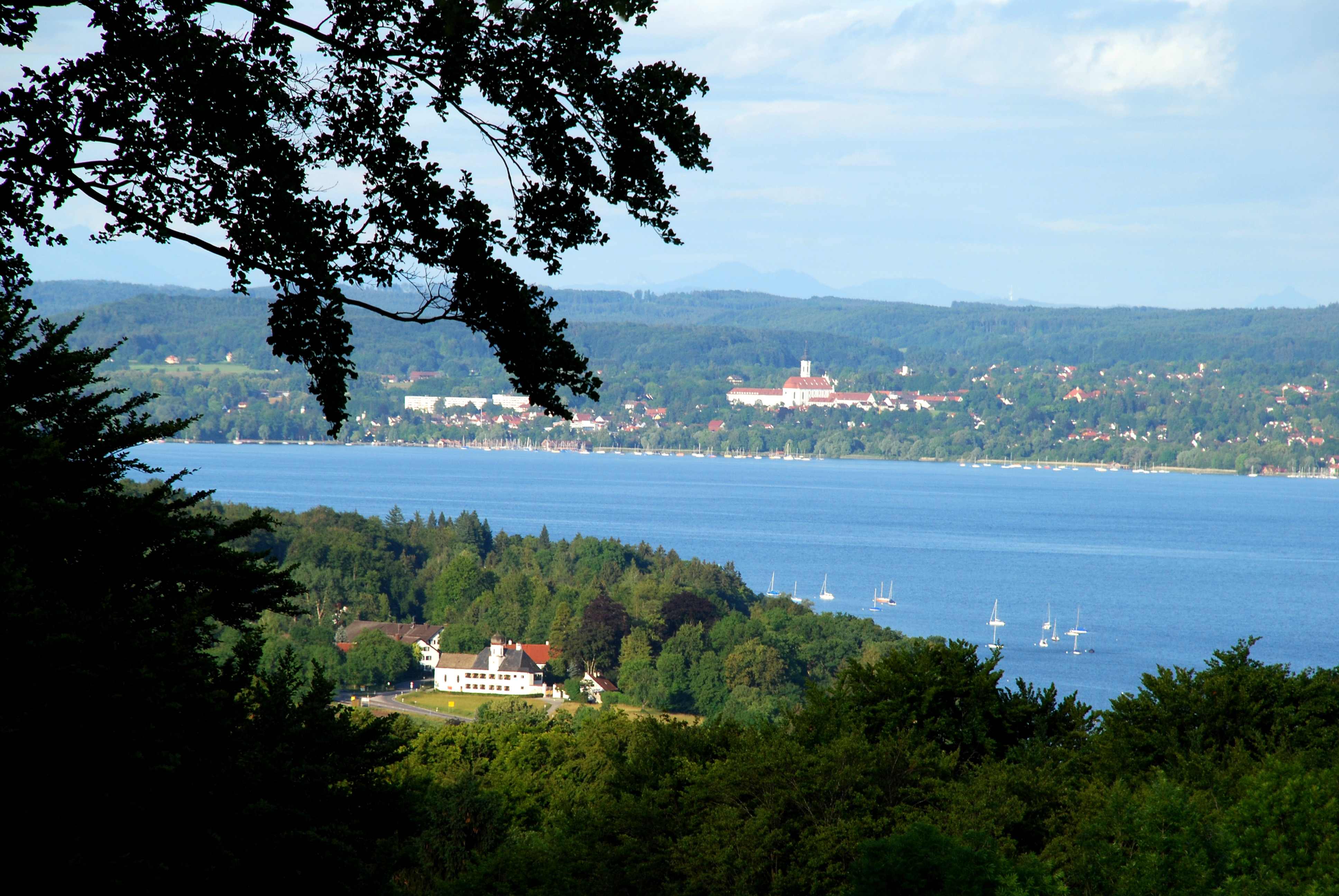 Herrsching. Links unten im Bild Schloss Mühlfeld. Auf der gegenüberliegenden Seite des Ammersees fällt der Blick auf die Klosterkirche und erhaltene Gebäude des ehemaligen Augustiner-Chorherrenstifts Dießen.